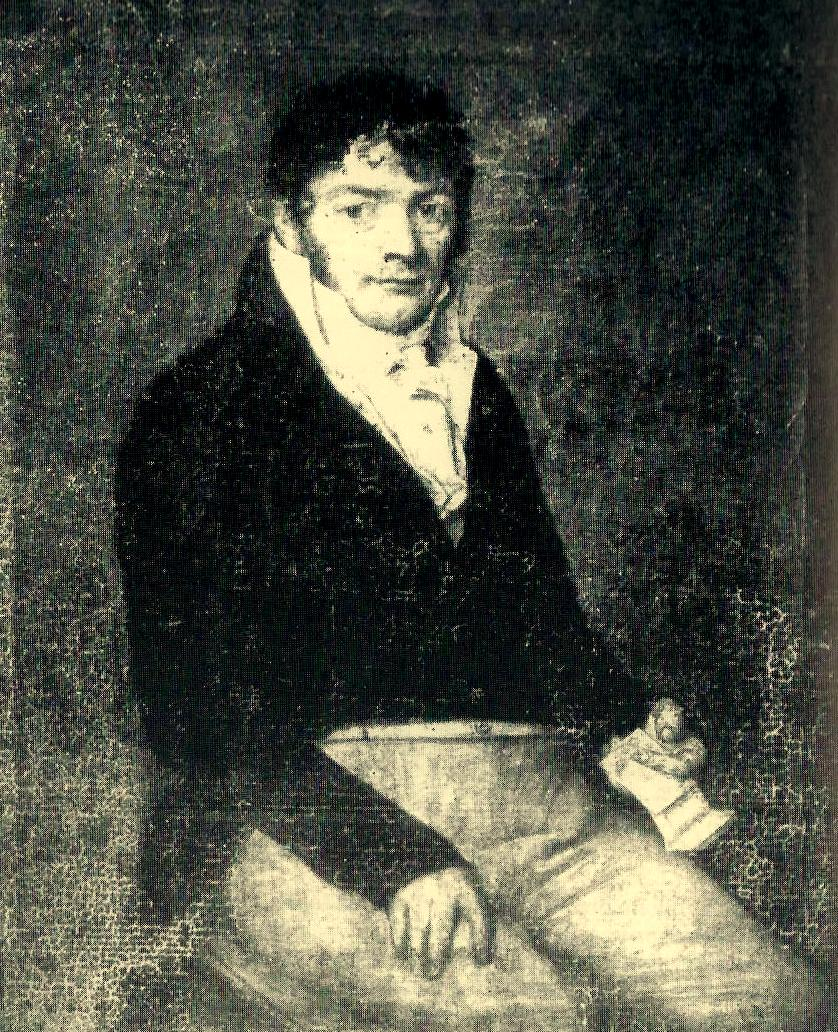 Scan von Francois Joseph Rudler nach einem Foto